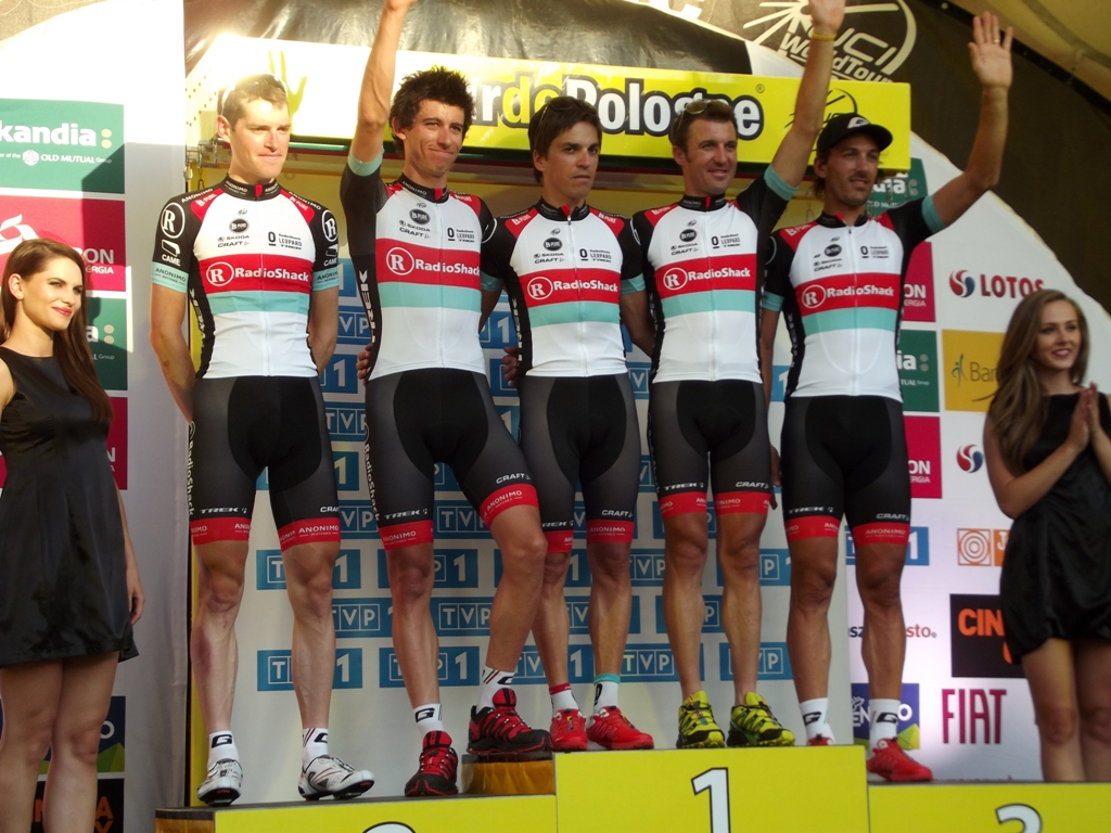 Zdjęcie zrobione podczas VII etapu 70. jubileuszowego Tour de Pologne w Krakowie.